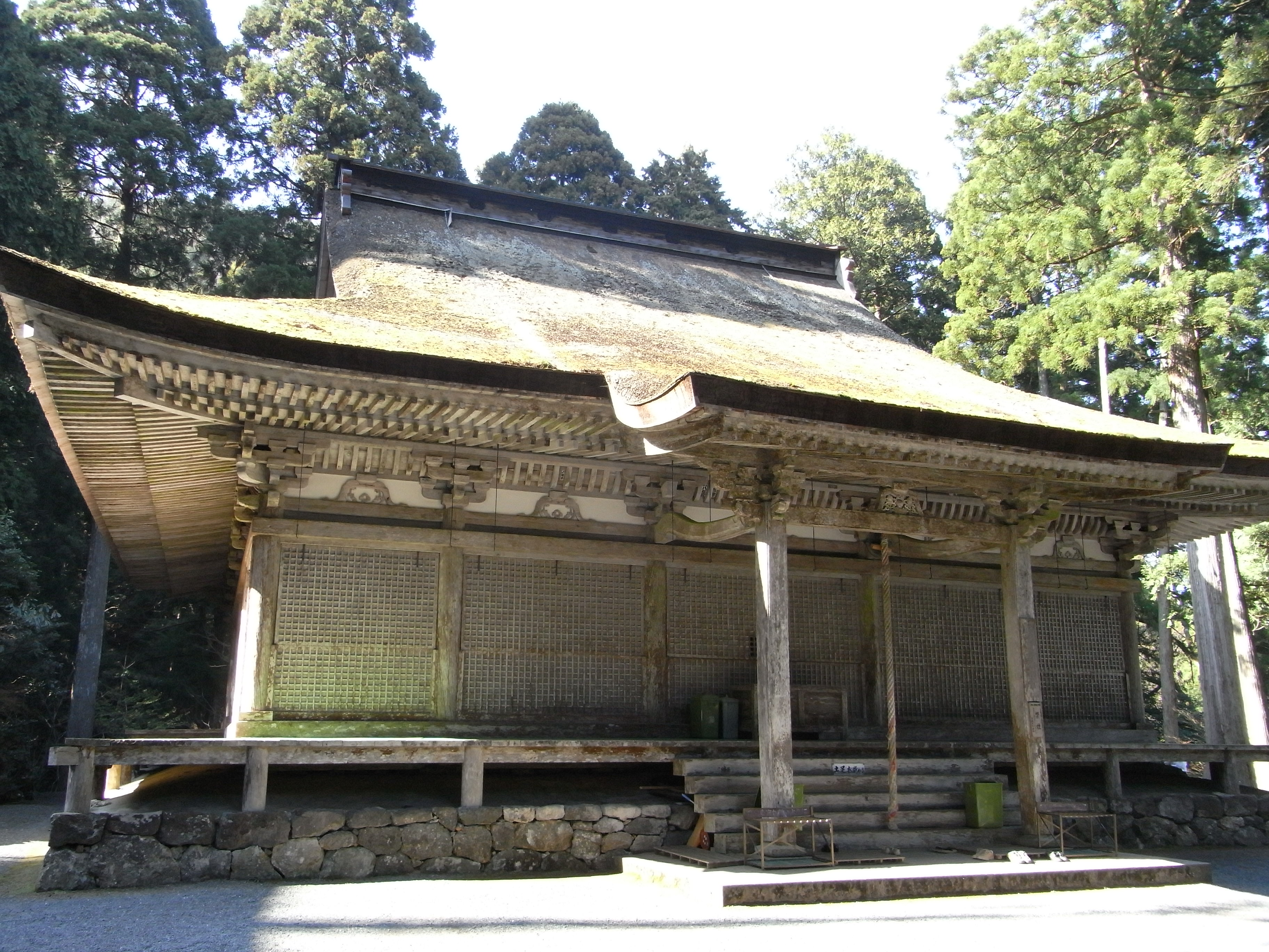 福井県小浜市、明通寺本堂。 Ricoh R10